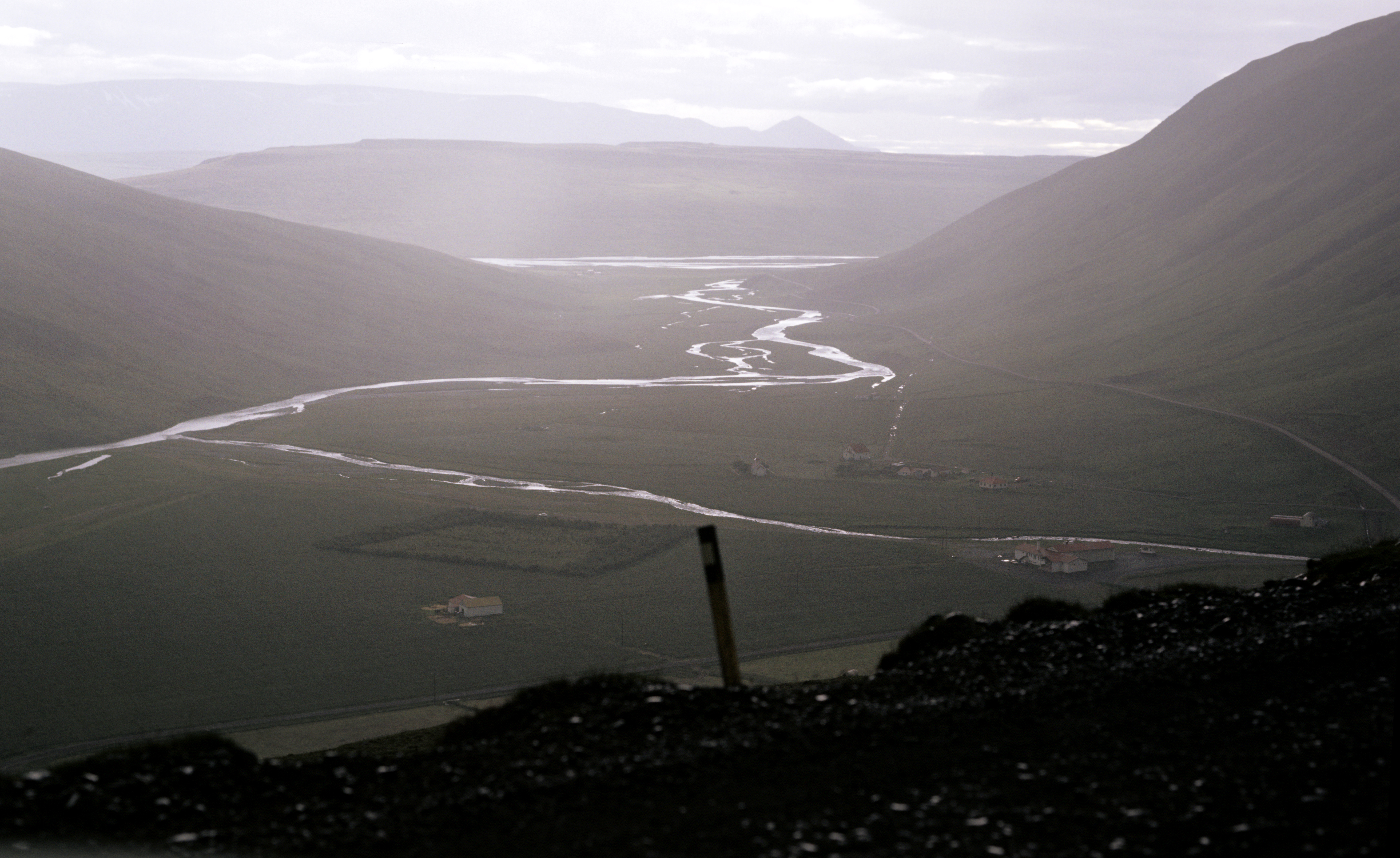 Von Varmahlíð naxh Blönduós. Blick vom Pass nach Bólstaðahlíð. Hinten verläuft quer Langidalur.